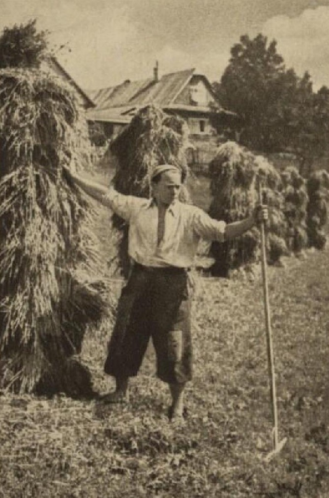 Alois Schneiderka, český malíř